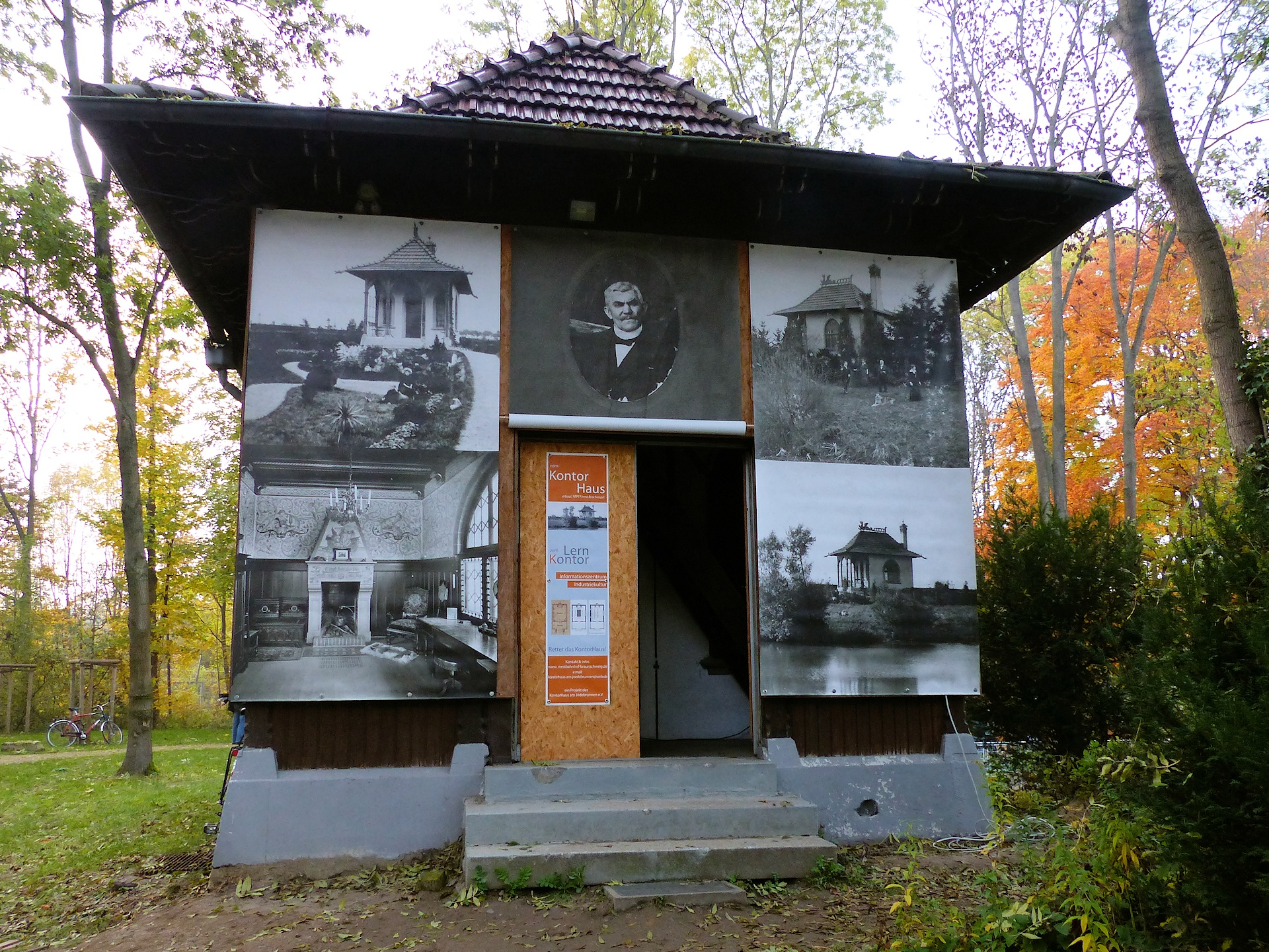 Kontorhaus beim Westival 2015, die mit Holzplatten geschützte Veranda wurde als Infotafel genutzt.